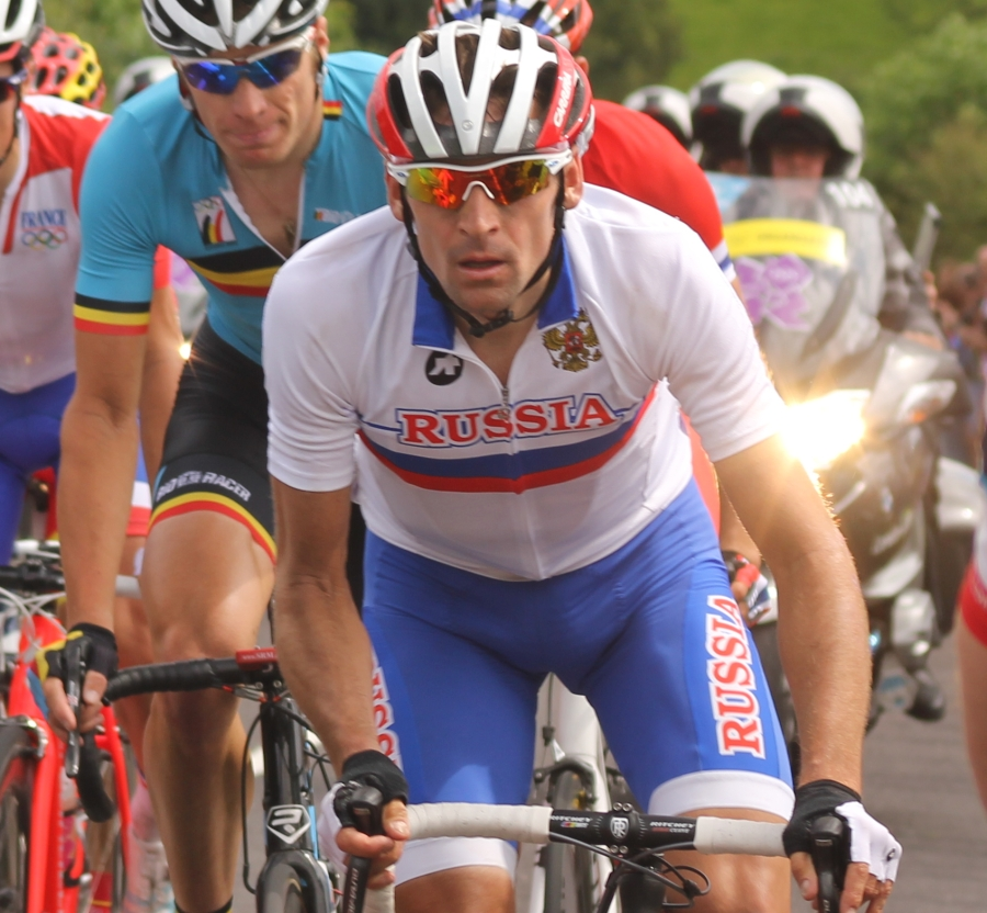 Menchov aux JO de Londres - Course en ligne